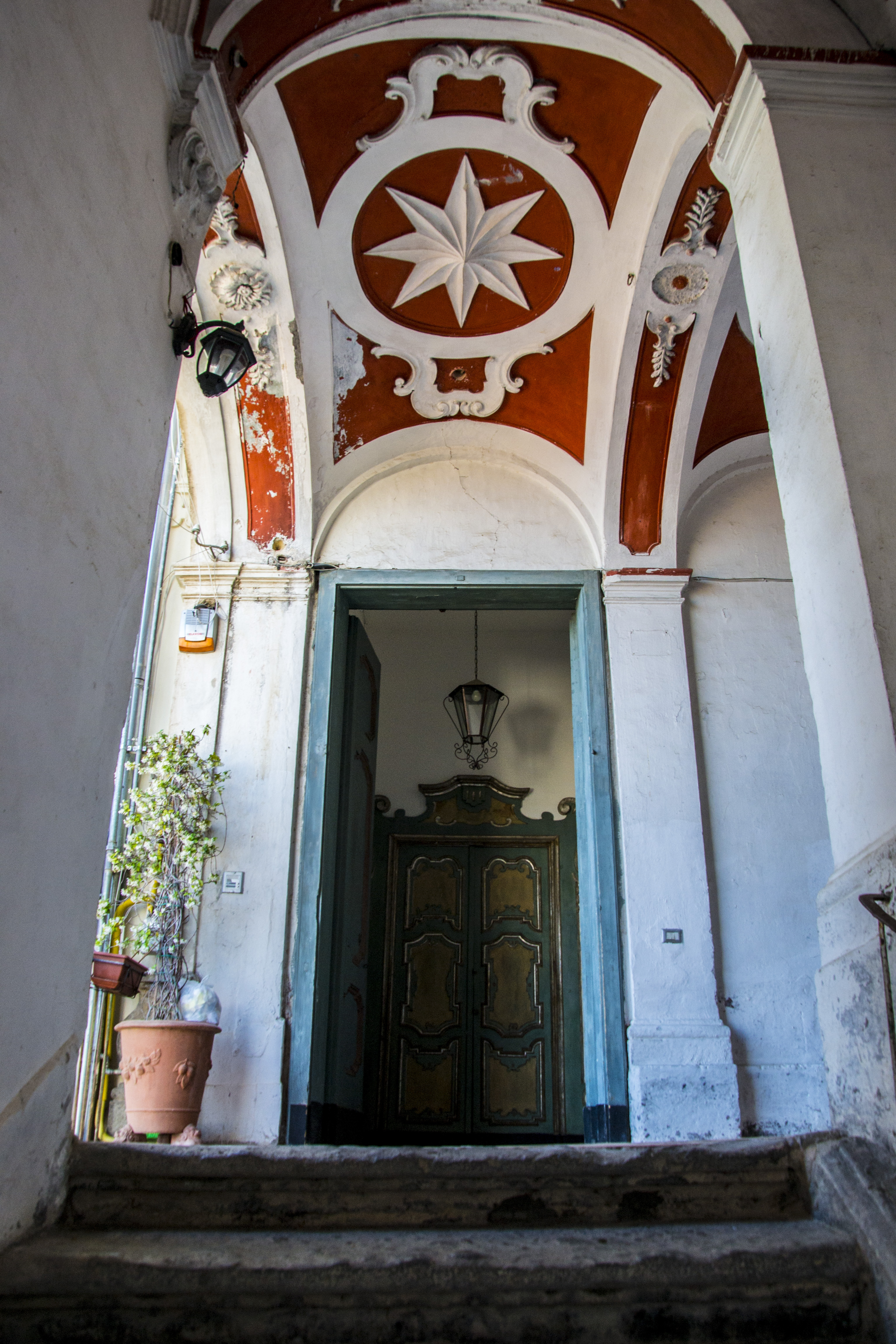 Dettaglio degli interni di palazzo Copeta